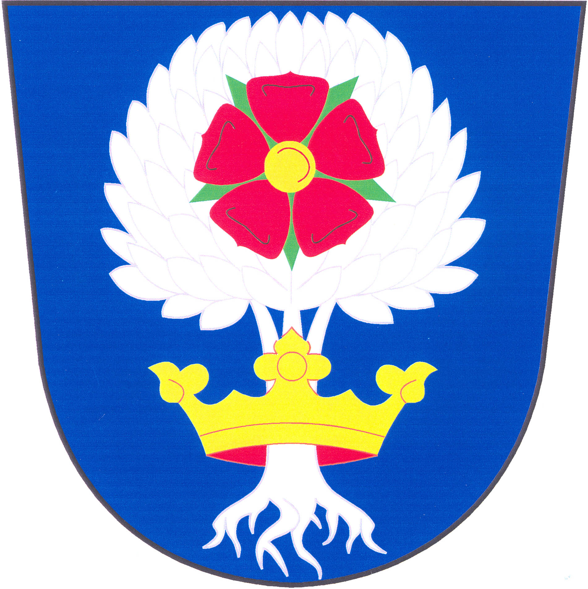 Znak obce Bukovice (okres Náchod)